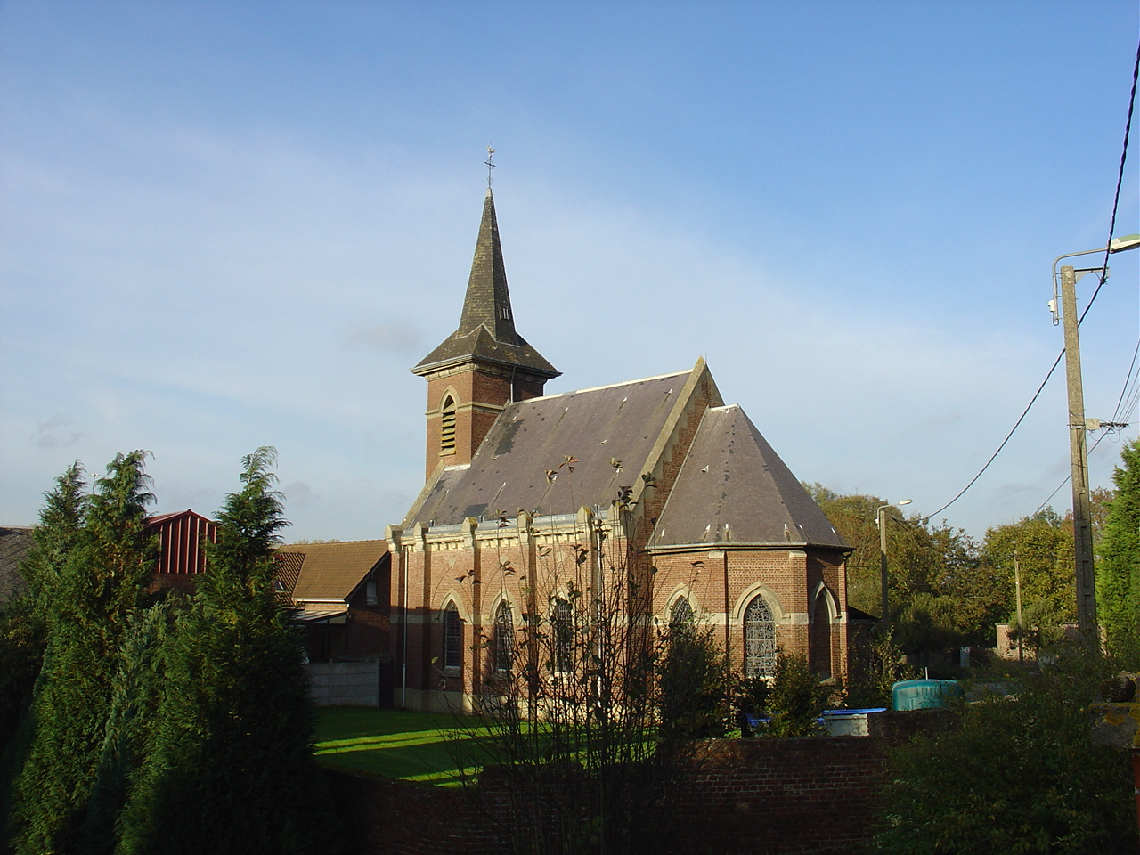 Église d'Héninel